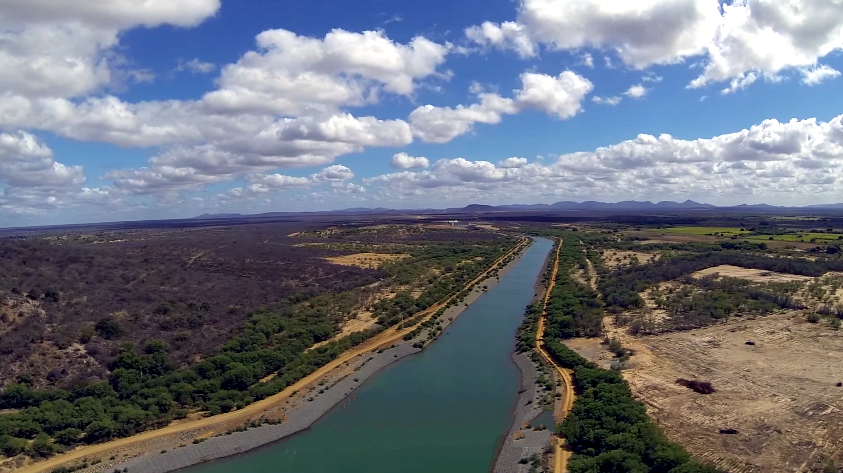 obras da Transposição do Rio São Francisco, em Cabrobó, Pernambuco, Brasil.